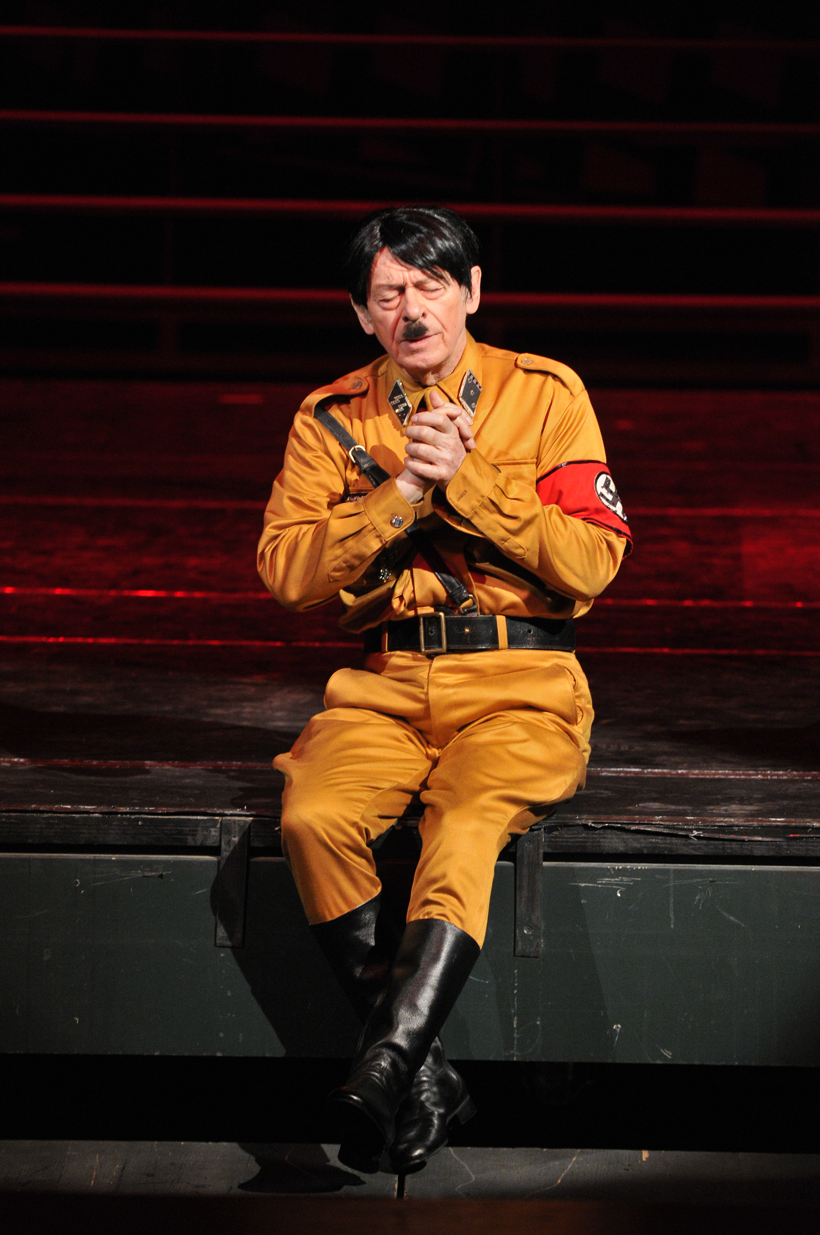 Premijera predstave "Producenti"